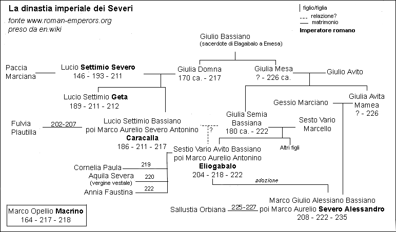 Albero genealogico imperatori SeveriIl file consiste in una tabella presa da en.wiki (Image:SeveranDynasty.png) e rielaborata da me per tradurla in italiano. Per quanto mi riguarda può essere di pubblico dominio, ma non so se su en.wiki aveva una licenza diversa da rispettare. Vero è che si potrebbe sostenere che sia abbastanza modificata da essere considerata un'immagine nuova MM 00:23, Dic 13, 2004 (UTC)